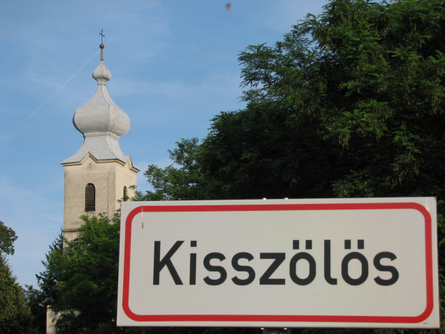 Helynévtábla a római katolikus templommal (Kisszőlős, Veszprém megye)